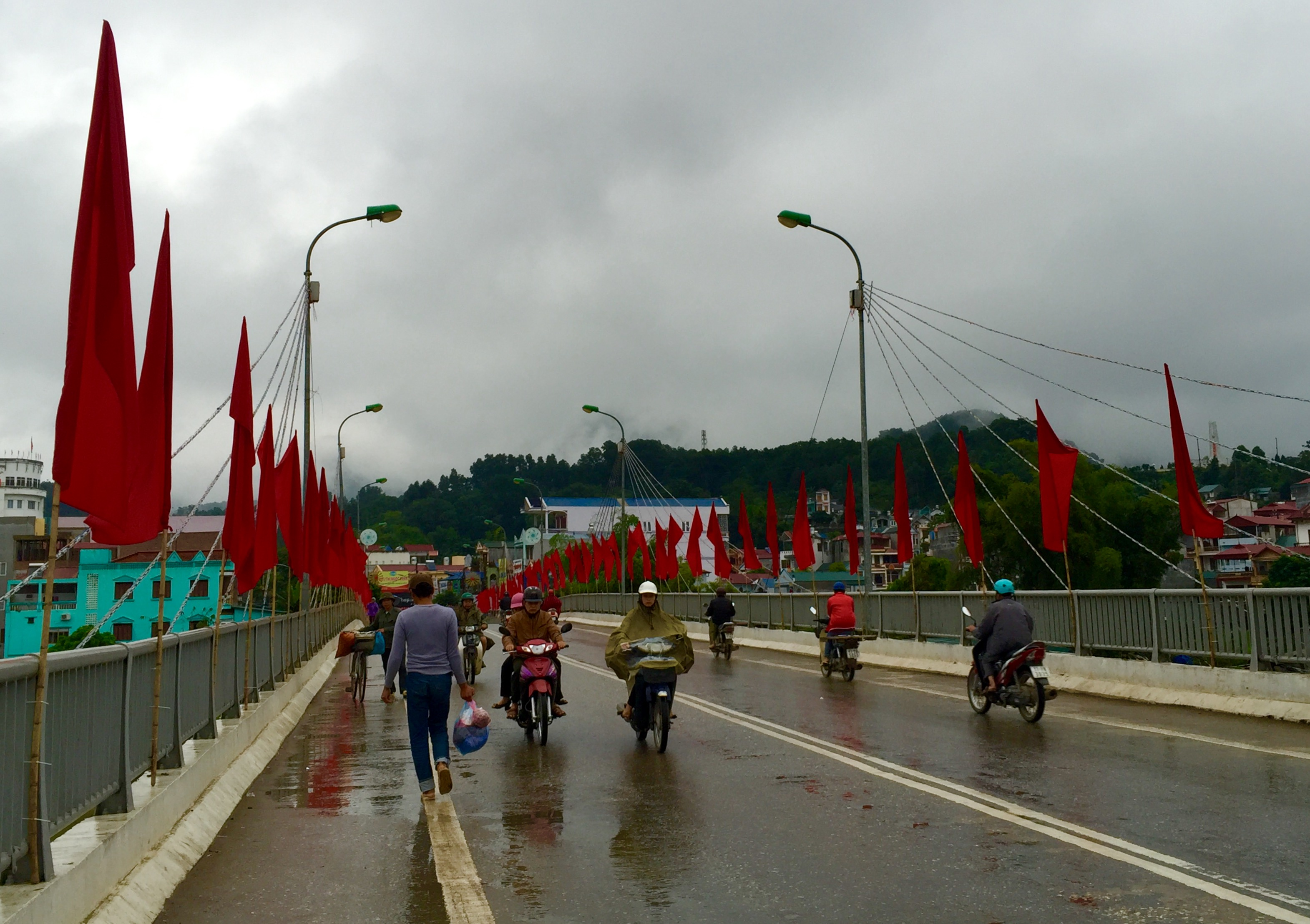 Hợp Giang, tp. Cao Bằng, Cao Bằng, Vietnam